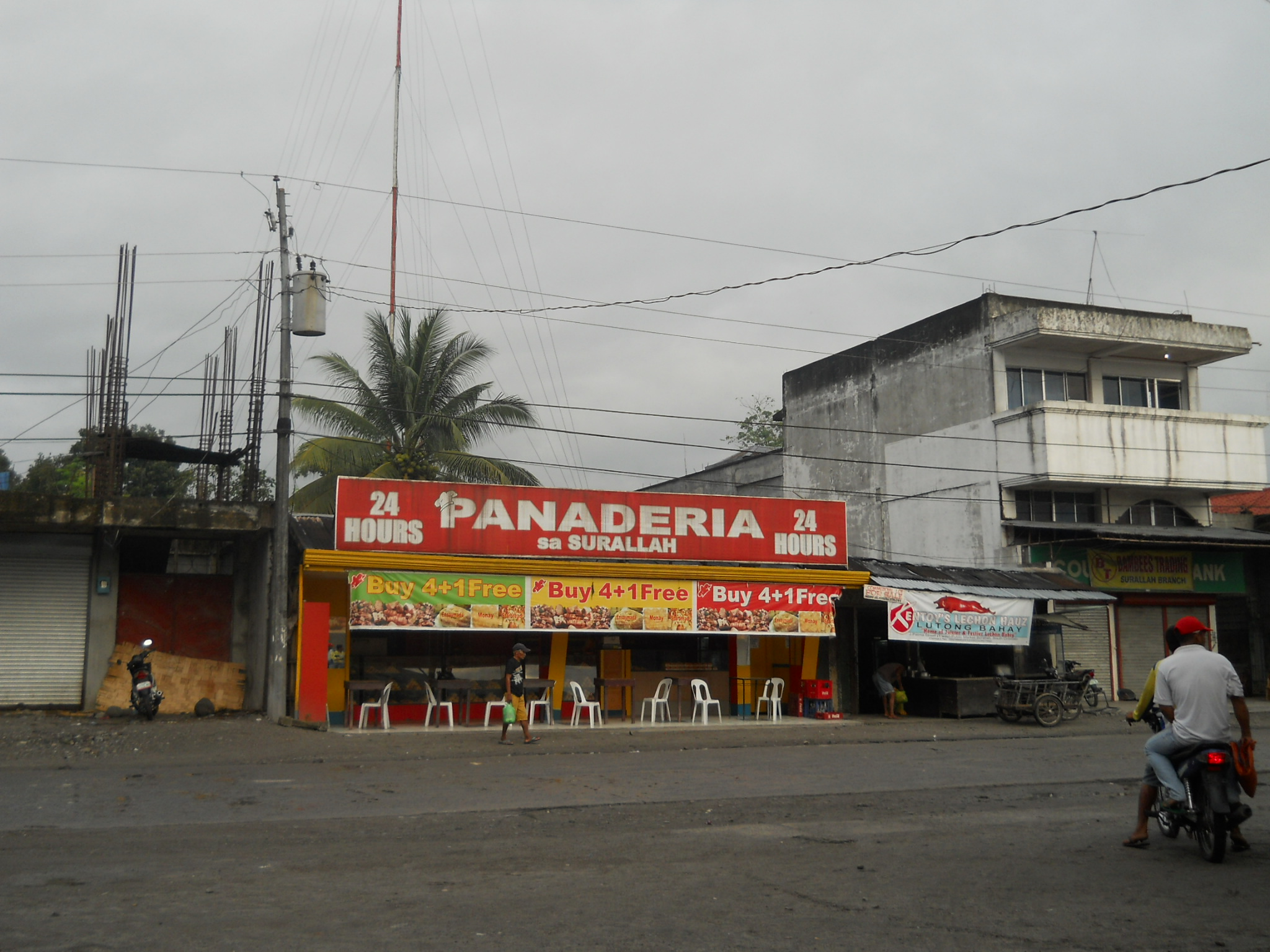 Panaderia bakery, Surallah, South Cotabato